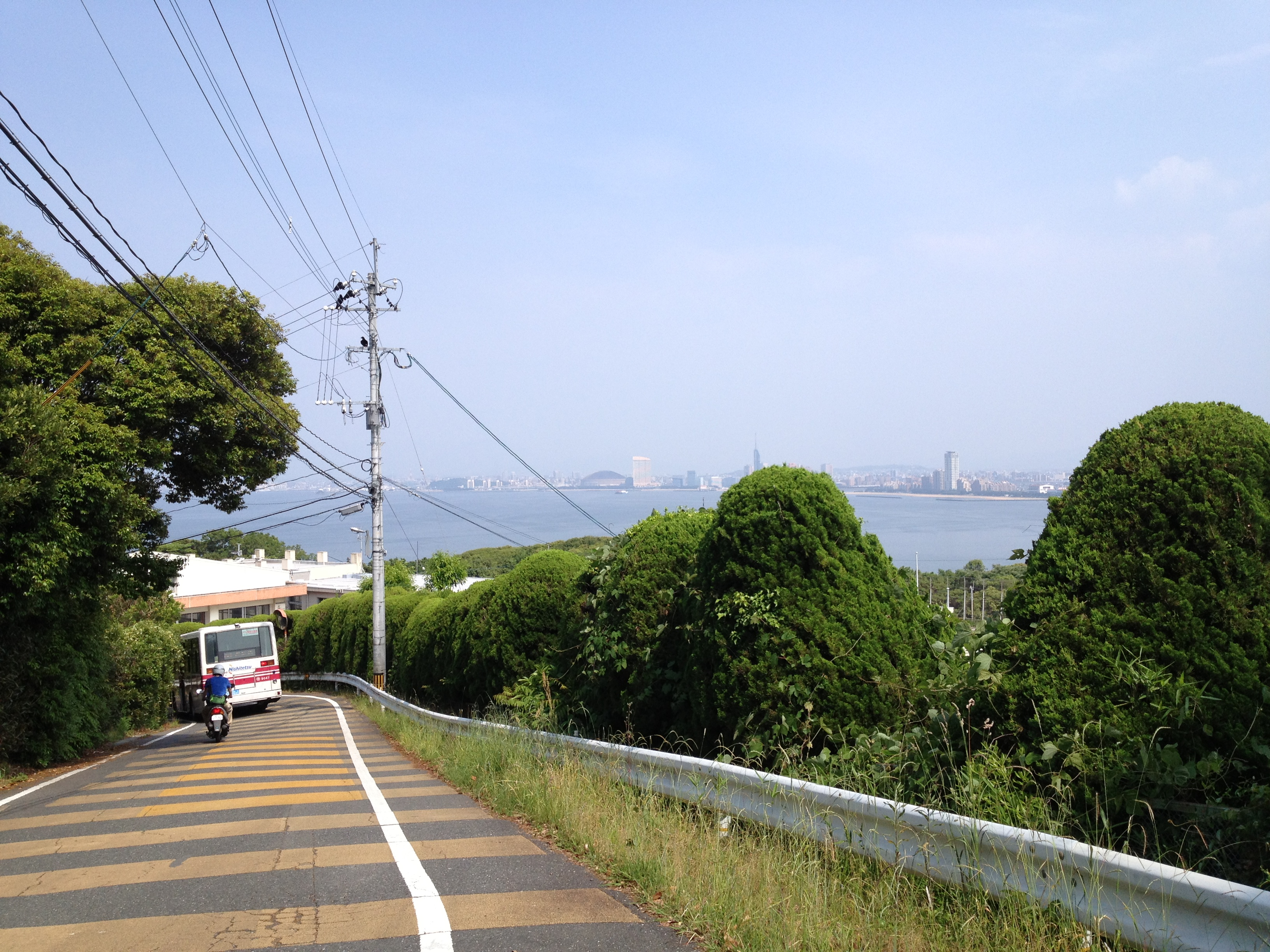 能古島から眺める福岡市内と西鉄バス